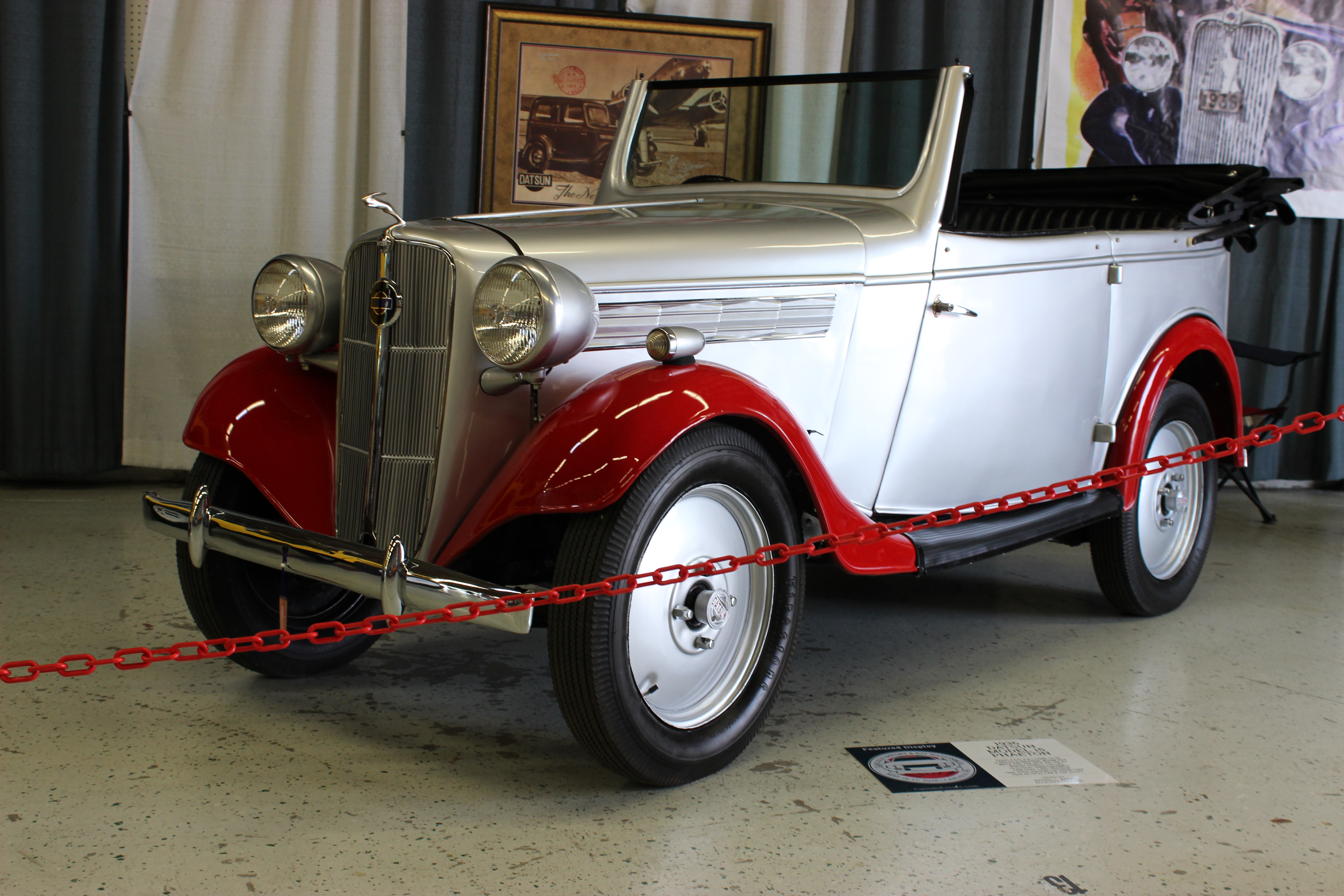 Datsun Model 15 Phaeton